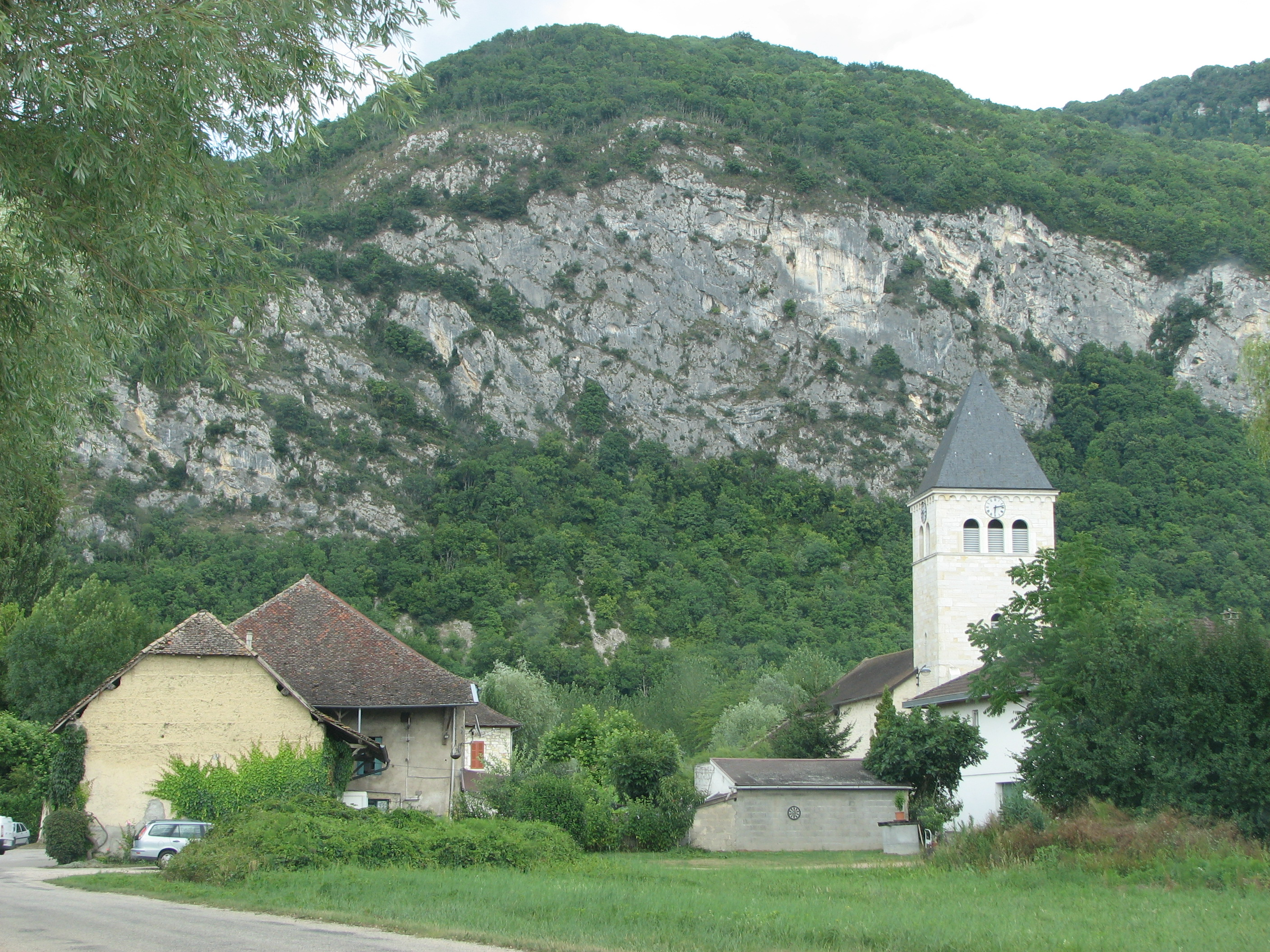 Centre du village de Saint-Benoit (Ain)